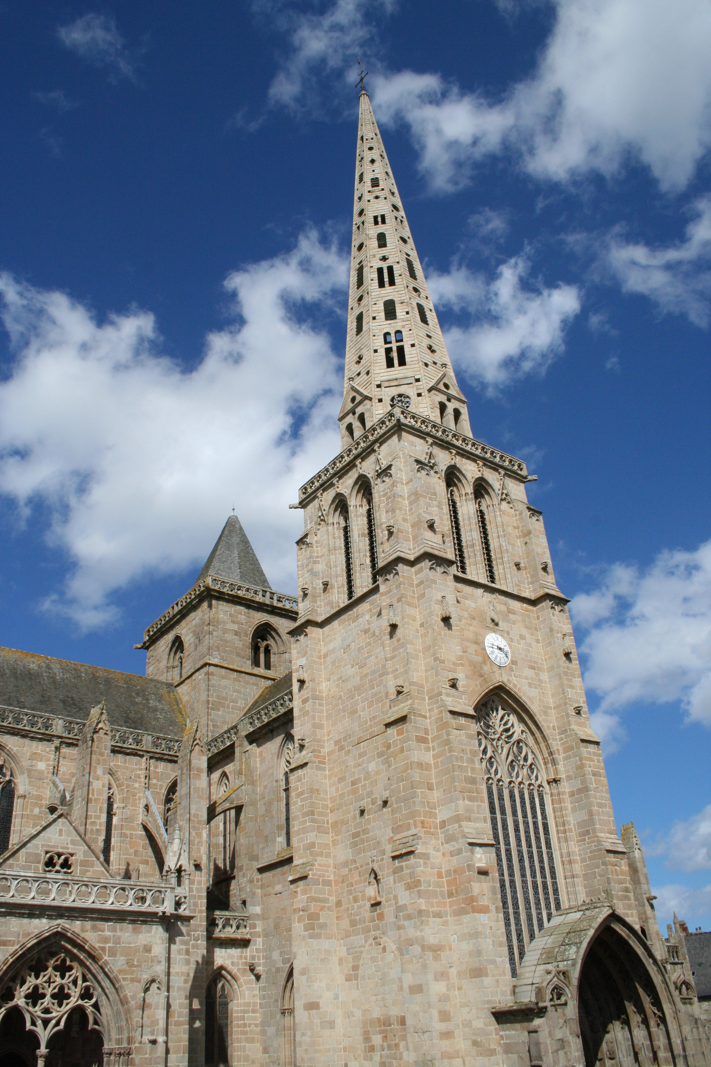 Cathédrale Saint-Tugdual de Tréguier - Tréguier - Côtes d'Armor - France. De gauche à droite: le porche du Peuple, la tour du Sanctus, le porche et la tour des Cloches. .